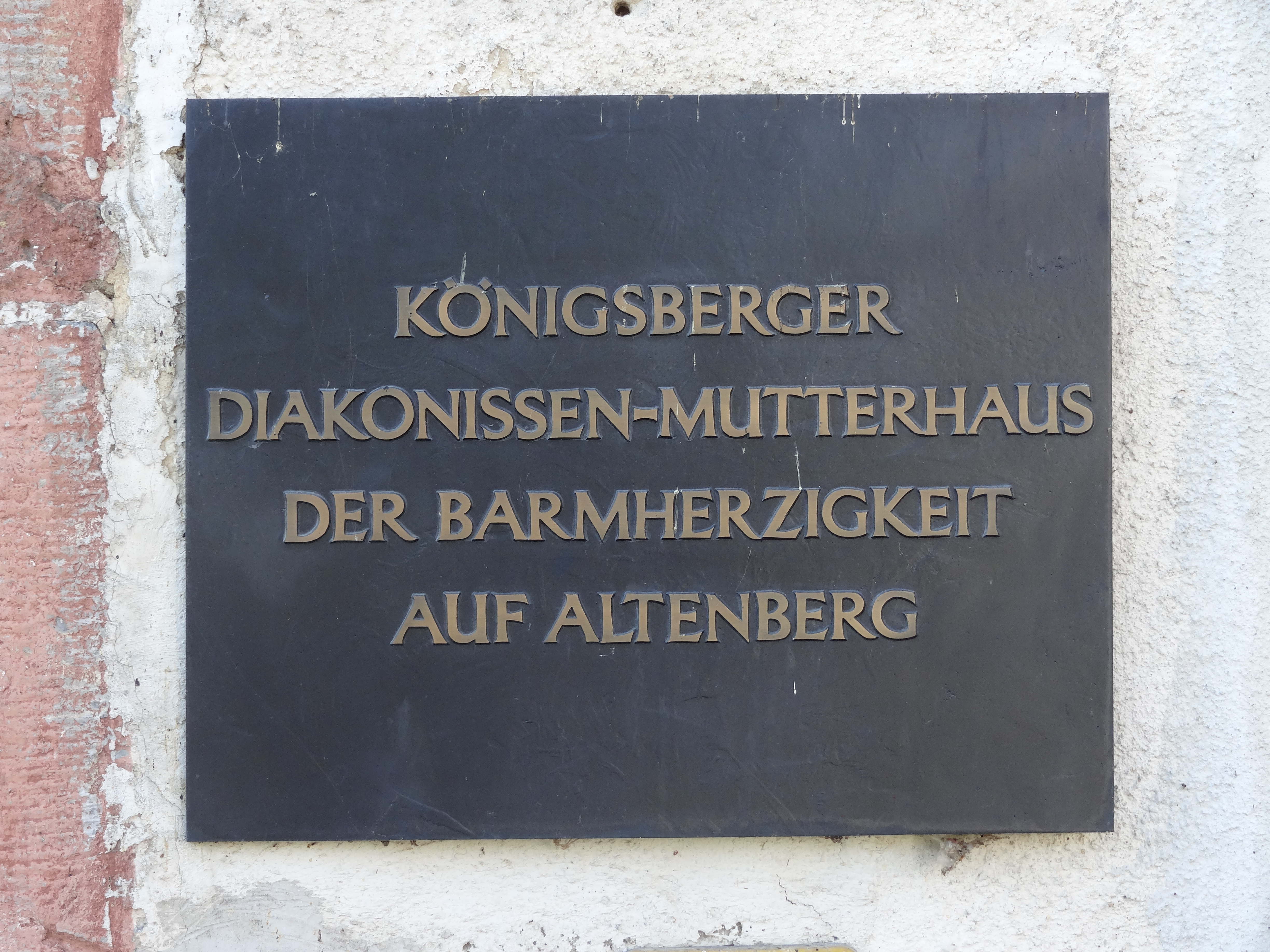 Kloster Altenberg (Solms)